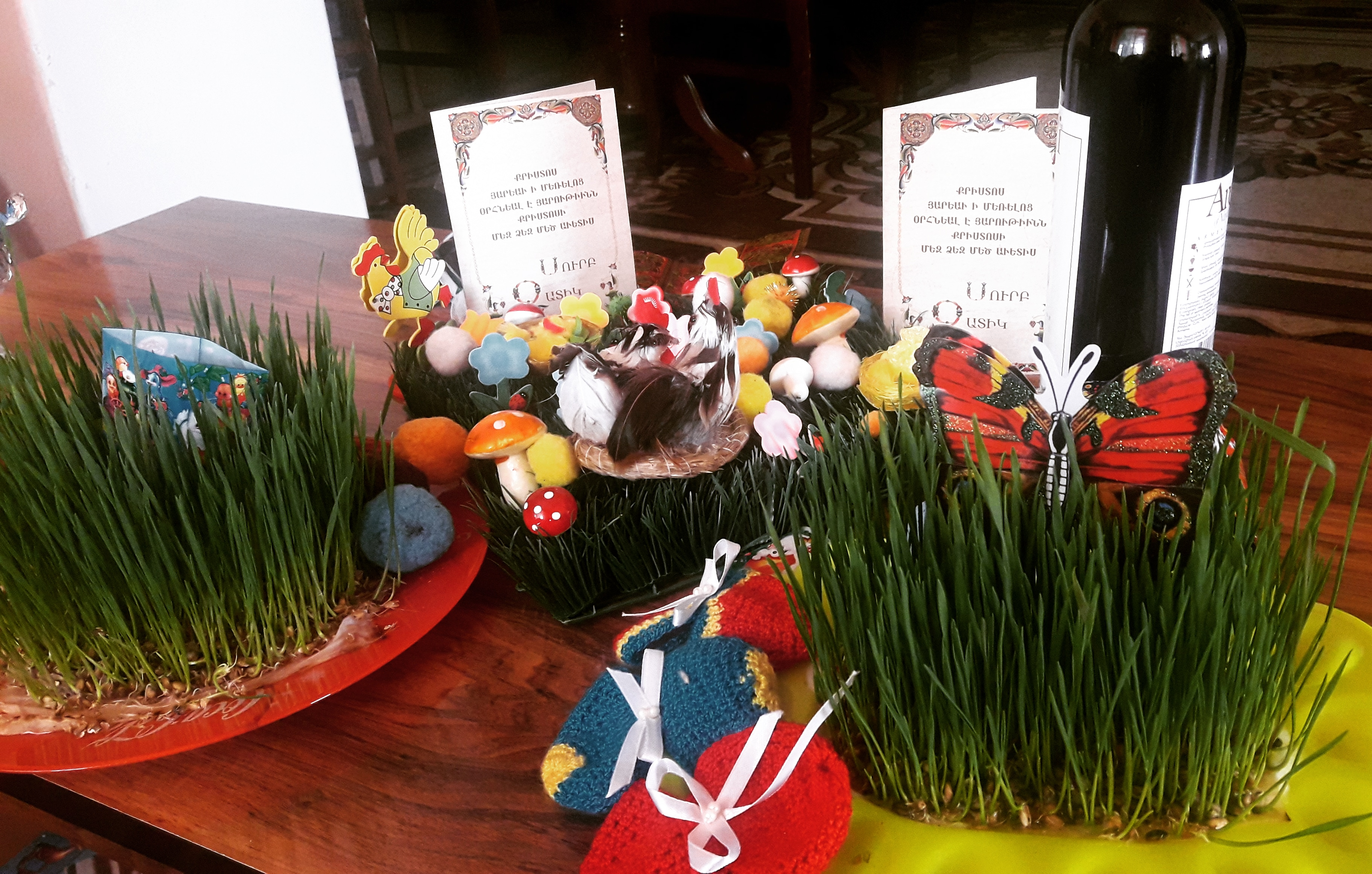 Զատիկ կամ Հիսուս Քրիստոսի հրաշափառ Հարության տոն (եբր.՝ פסח նշանակում է անցում, զատում, բաժանում, հեռացում, հին հունարեն՝ πάσχα, լատիներեն՝ Pascha), քրիստոնյա եկեղեցիների, այդ թվում նաև Հայ Առաքելական Եկեղեցու հնագույն և գլխավոր տոնը, հինգ տաղավար տոներից մեկը։